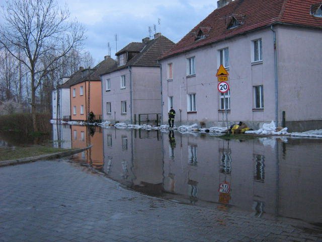 Zalana ulica Nowa w Trzebiatowie